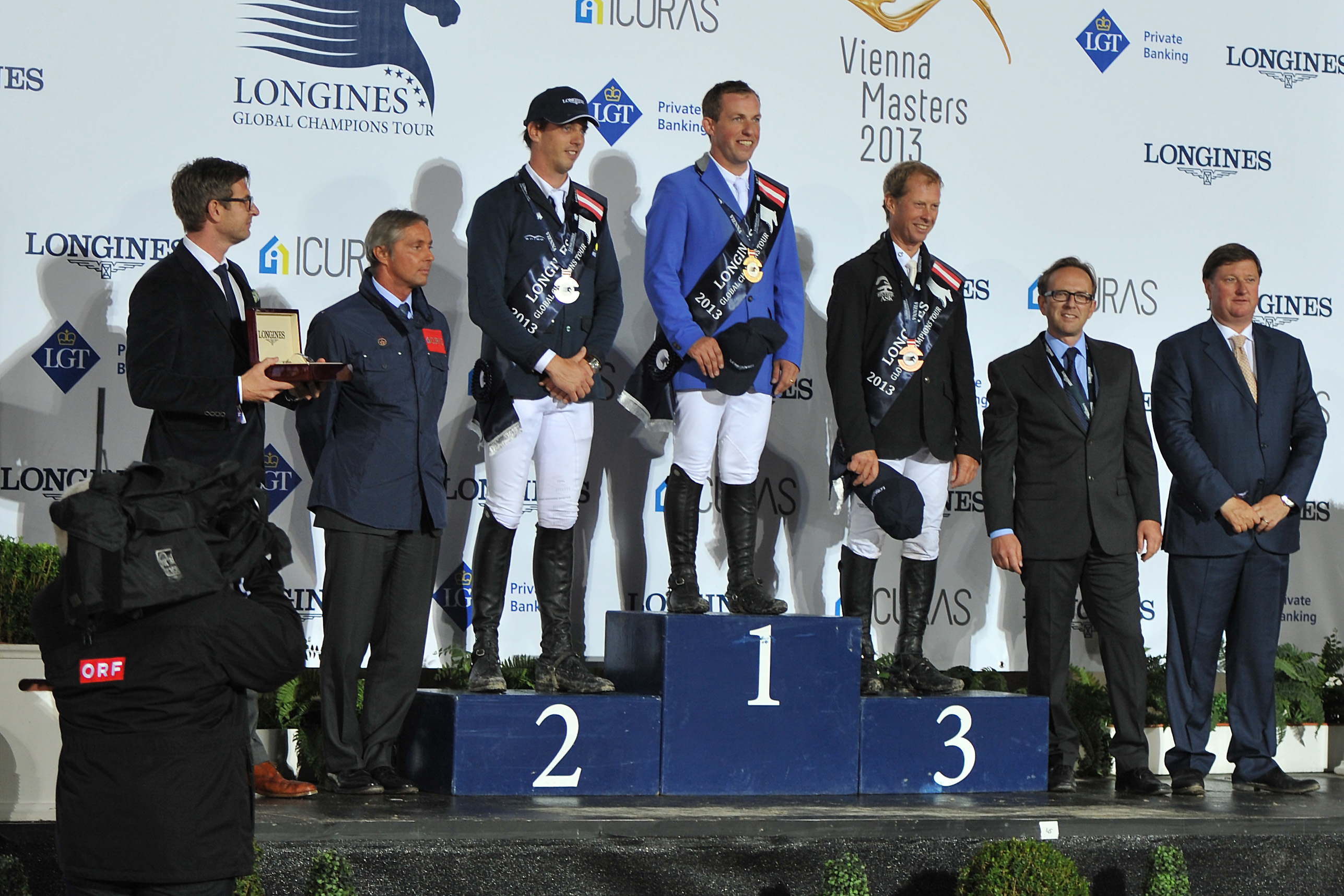 Vienna Masters am 21. September 2013 Longines Global Champions Tour Siegerehrung